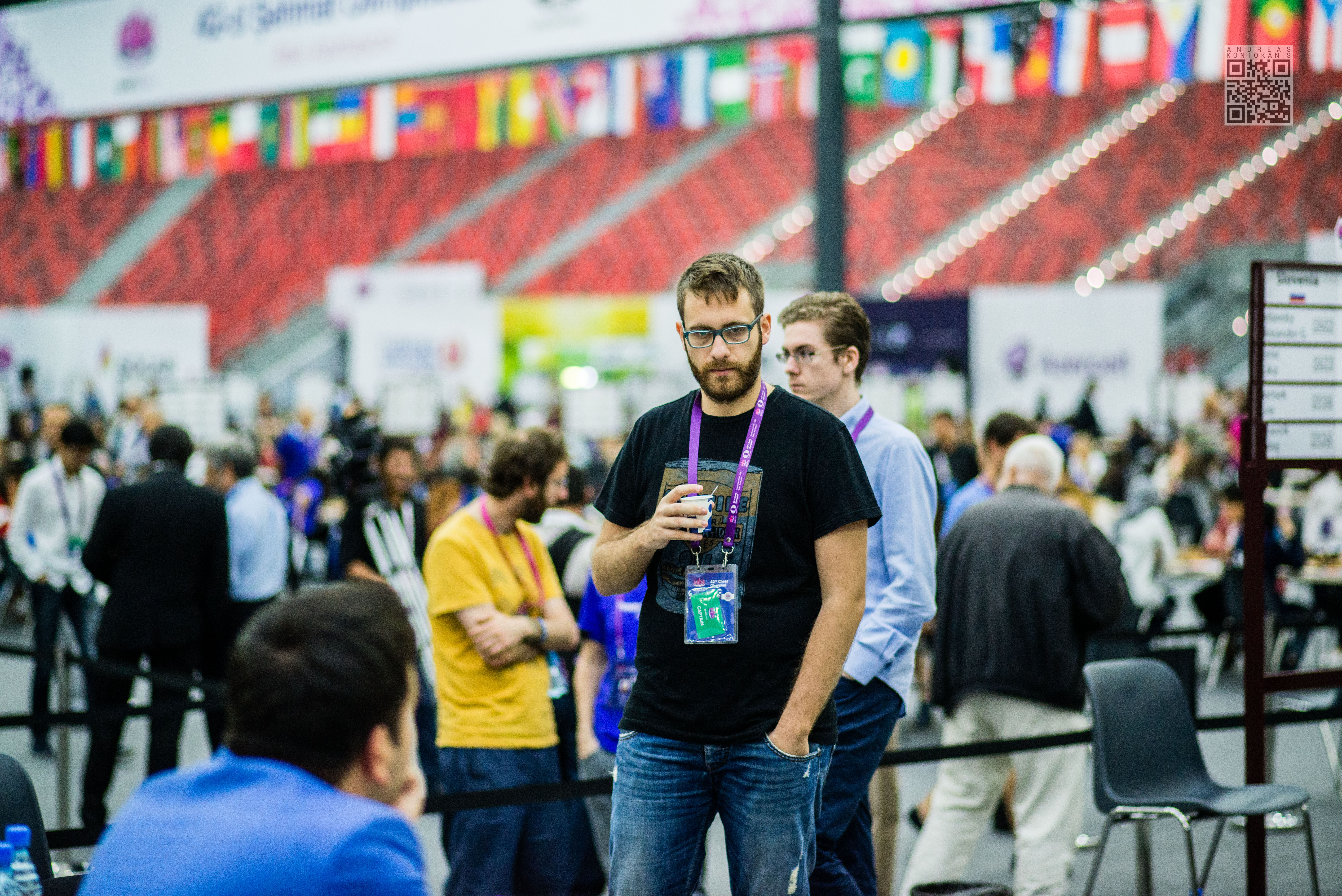 Pavlidis Antonios